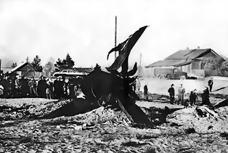 Останки разбившегося Миг-21.